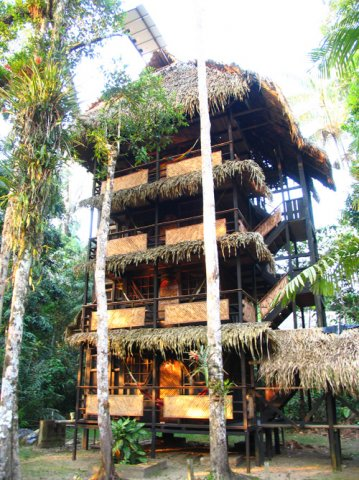 Le Tapir Lodge, l'un des écolodges ayant ouvert ses portes dans la réserve de Cuyabeno.